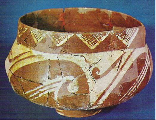 Останки от керамика намерени в местност Макаков мост